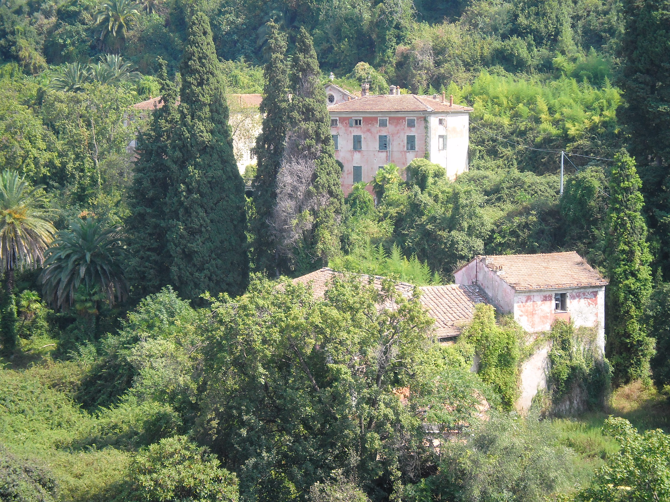 Veduta di villa Massoni a Massa, ripresa dal Castello Malaspina